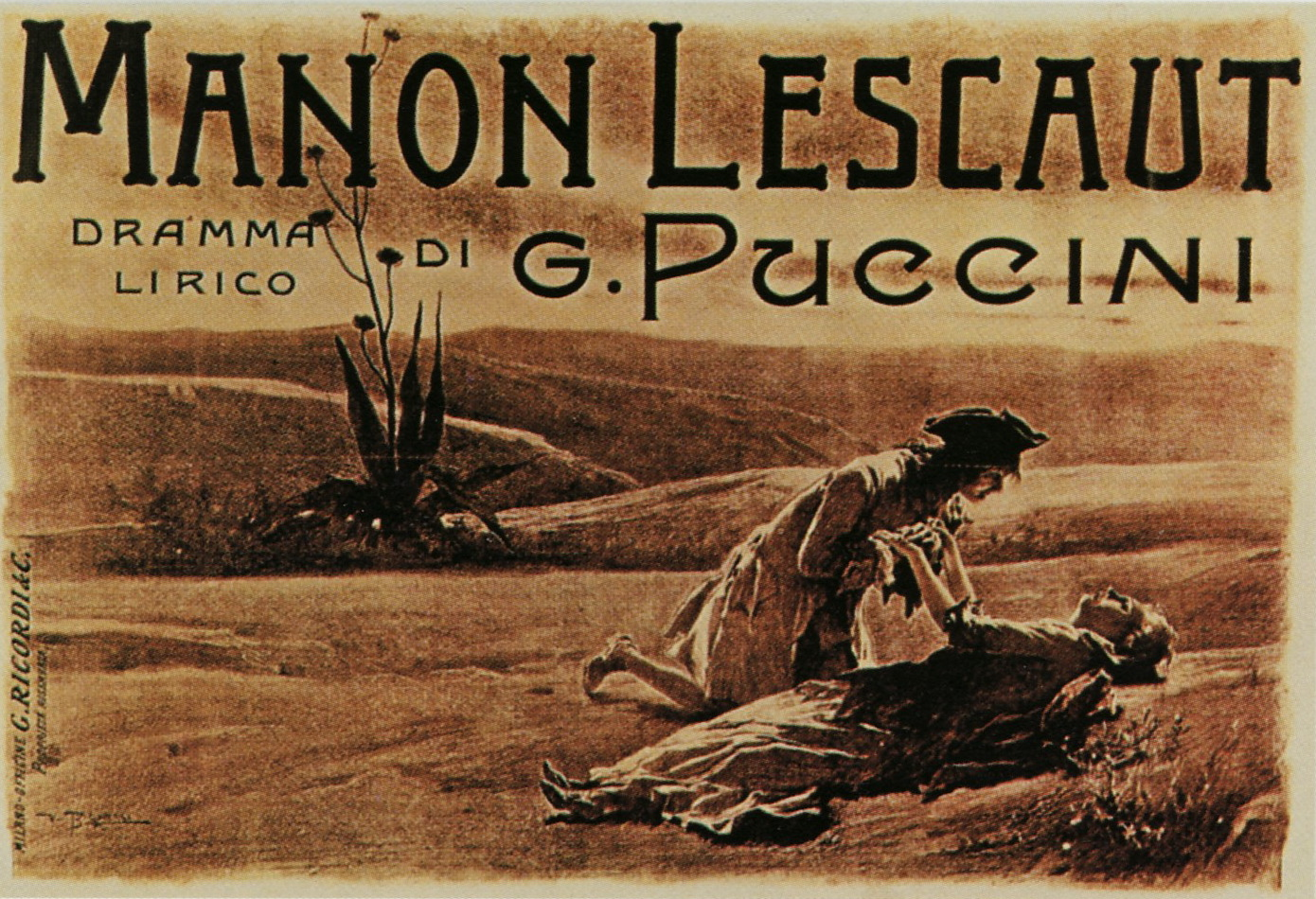 Cartolina tratta dalla locandina stampata da Ricordi in occasione della prima assoluta di Manon Lescaut di Giacomo Puccini, il 1° febbraio 1893.